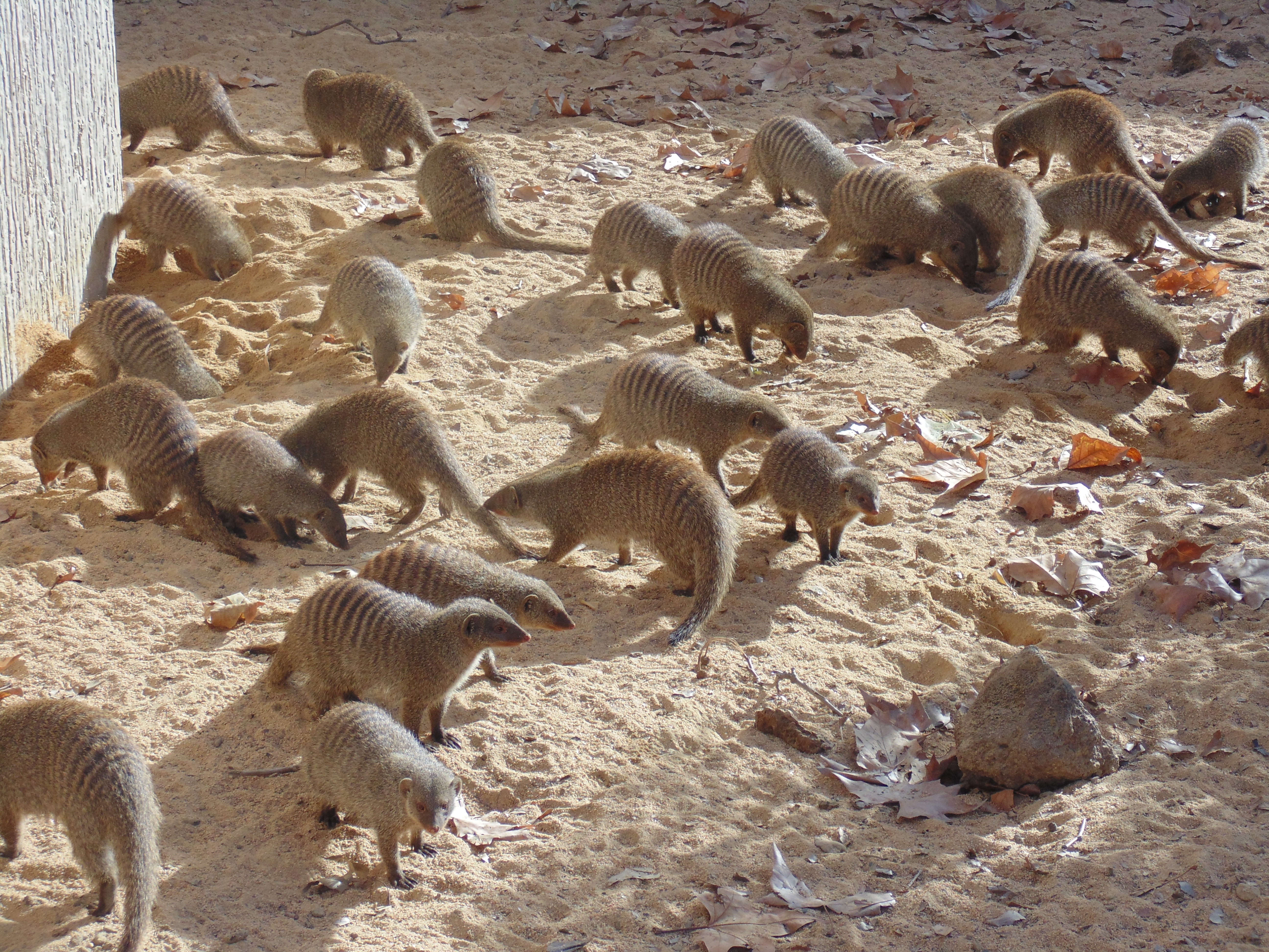 Un grup de mangostes ratllades al Zoo de Barcelona.